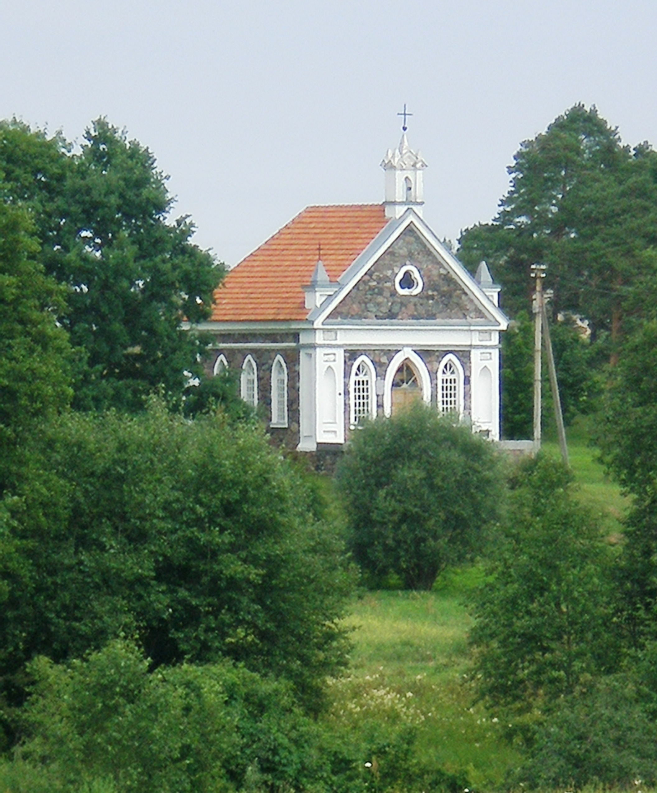 Rodų II koplyčia, Panevėžio raj.